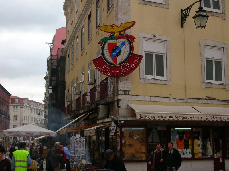 Esquina da Rua do Jardim do Regedor com a Rua das Portas de Santo Antão, na Baixa de Lisboa; grande emblema do Sport Lisboa e Benfica afixado no primeiro andar.